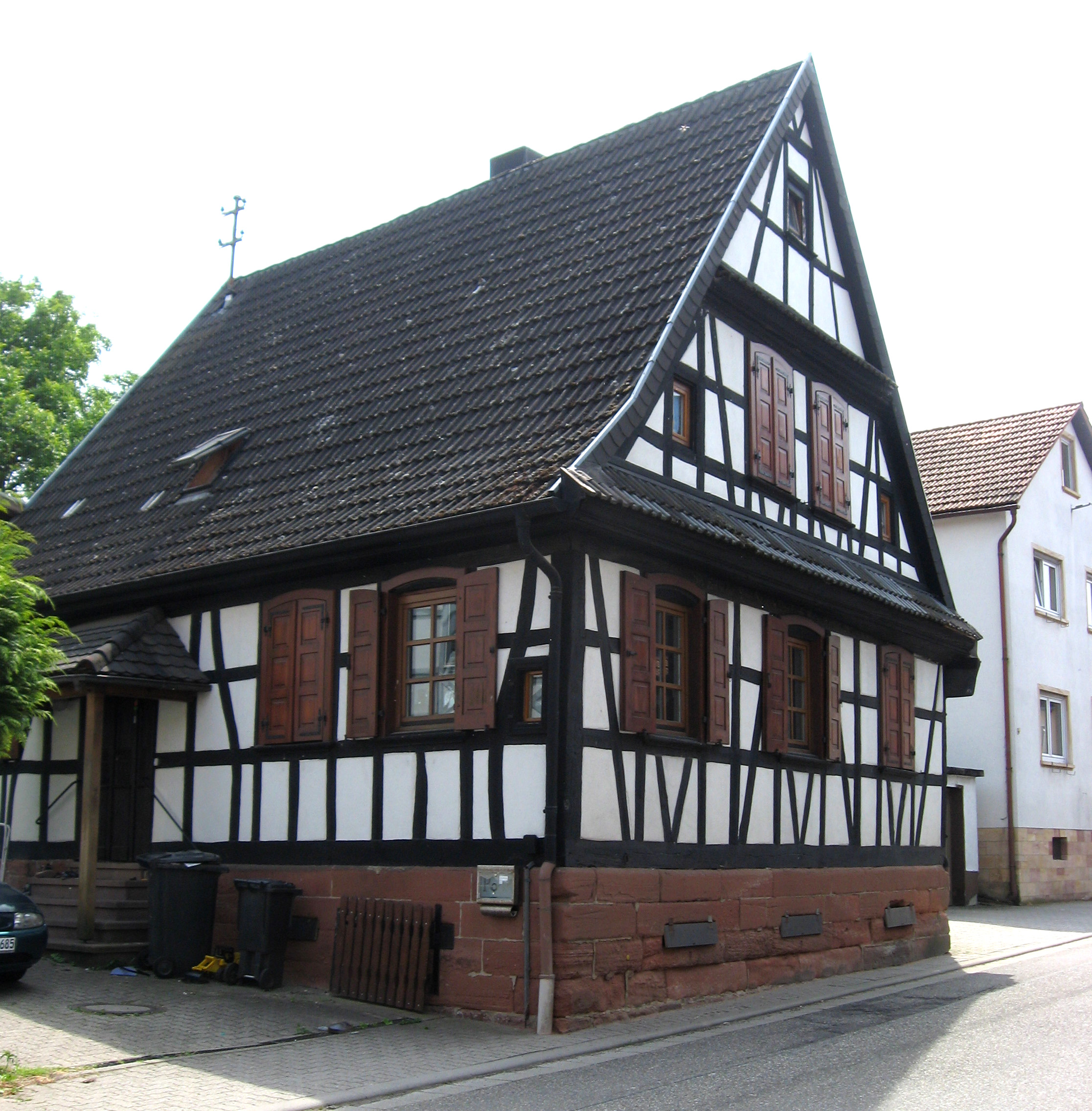 Fachwerkhaus Obere Hauptstraße 18 in Oberhausen; im Hausbalken über den unteren Fenstern bezeichnet Dieses Haus hat erbaut Christoph Wüst und dessen Ehefrau Elisabetha Wüst und Jahr nach der Geburt Christi 1840